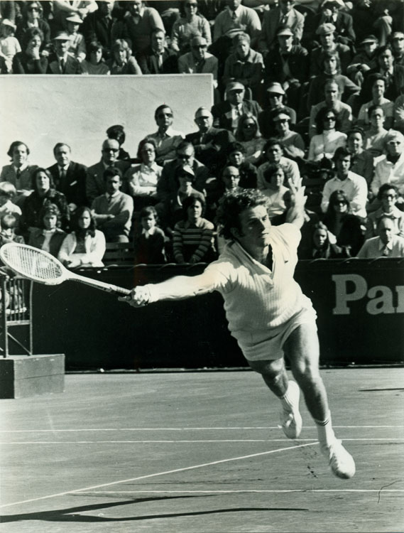 La fotografía pertenece al partido entre Jaime Fillol y el tenista argentino Julián Ganzabal. El partido terminó con el triunfo de Fillol y la adjudicación de la Zona Sudamericana por el equipo chileno.